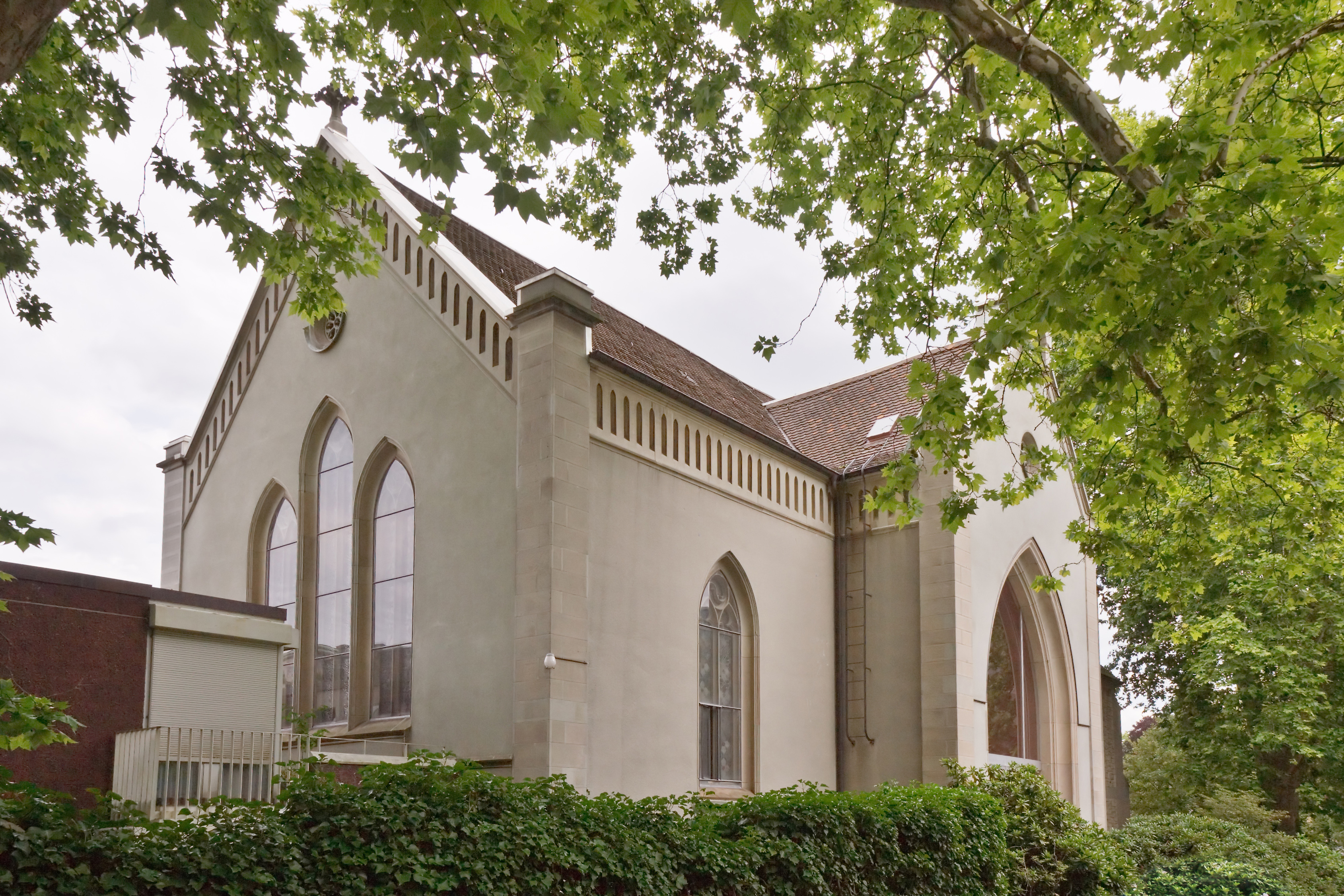 Die ehemalige Abdankungskapelle des Friedhofs Hohe Promenade in Zürich, Schweiz. Heute als Englische Kirche genutzt, mit Anbauten an zwei Seiten. Es ist das erste neugotische Gebäude Stadlers[1]. ↑ Andreas Hauser: Ferdinand Stadler. Zürich : Krauthammer 1976